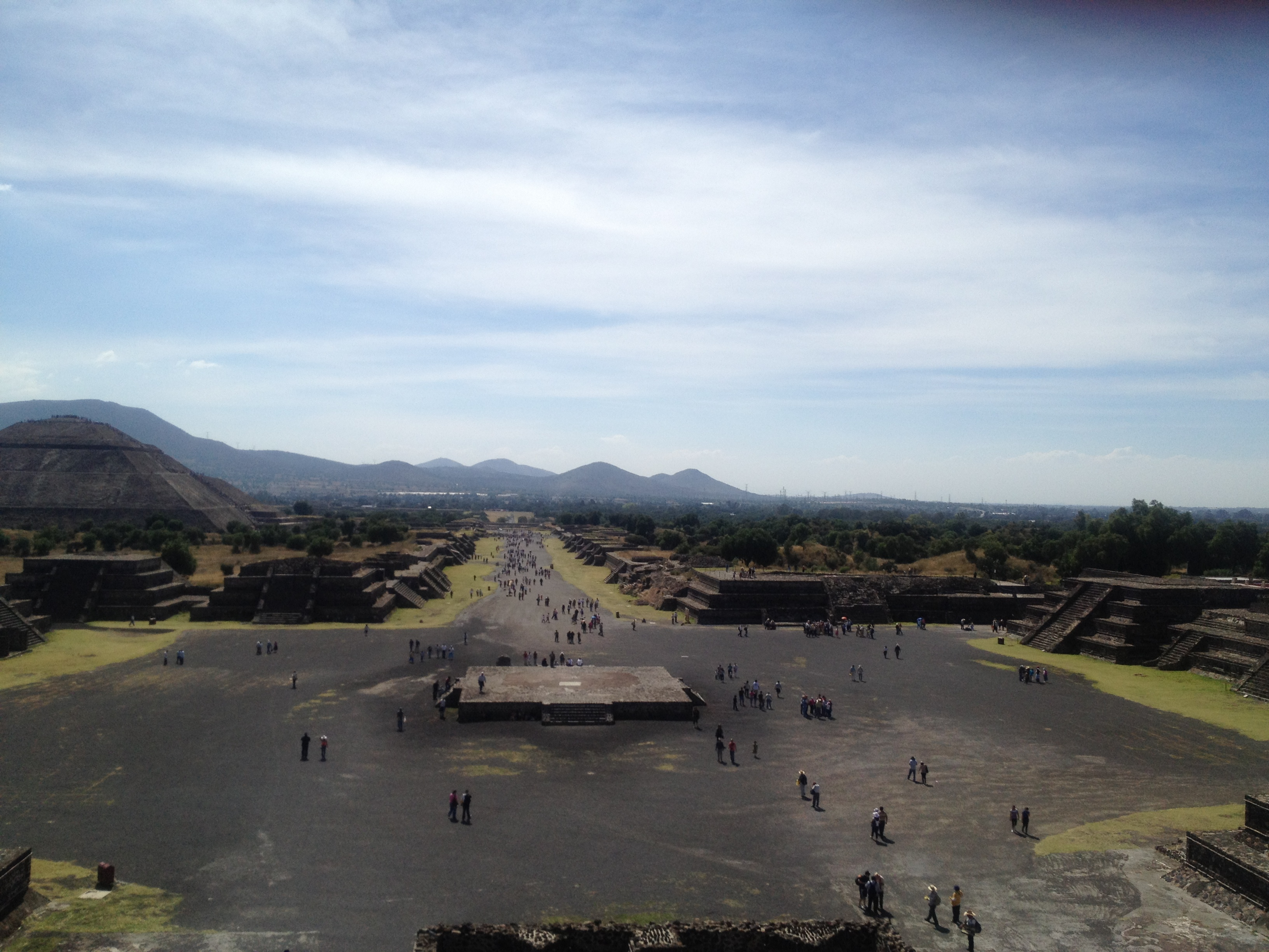 Teotihuacan